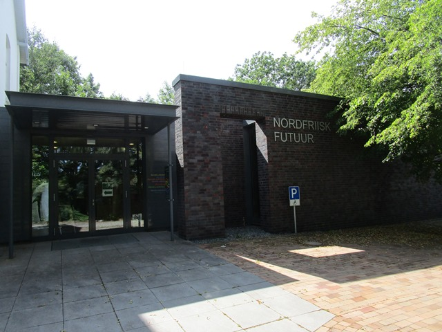 Nordfriisk Futuur i Bredsted / Bräist